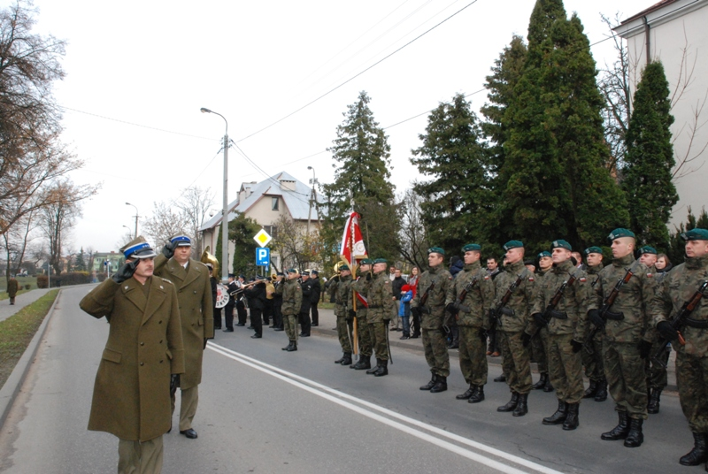 Garnizon Przasnysz, 2013r. Dowódca Garnizonu, jednocześnie dowódca 2 ORel płk Witold Łukaszewski podczas uroczystości z okazji 11 listopada